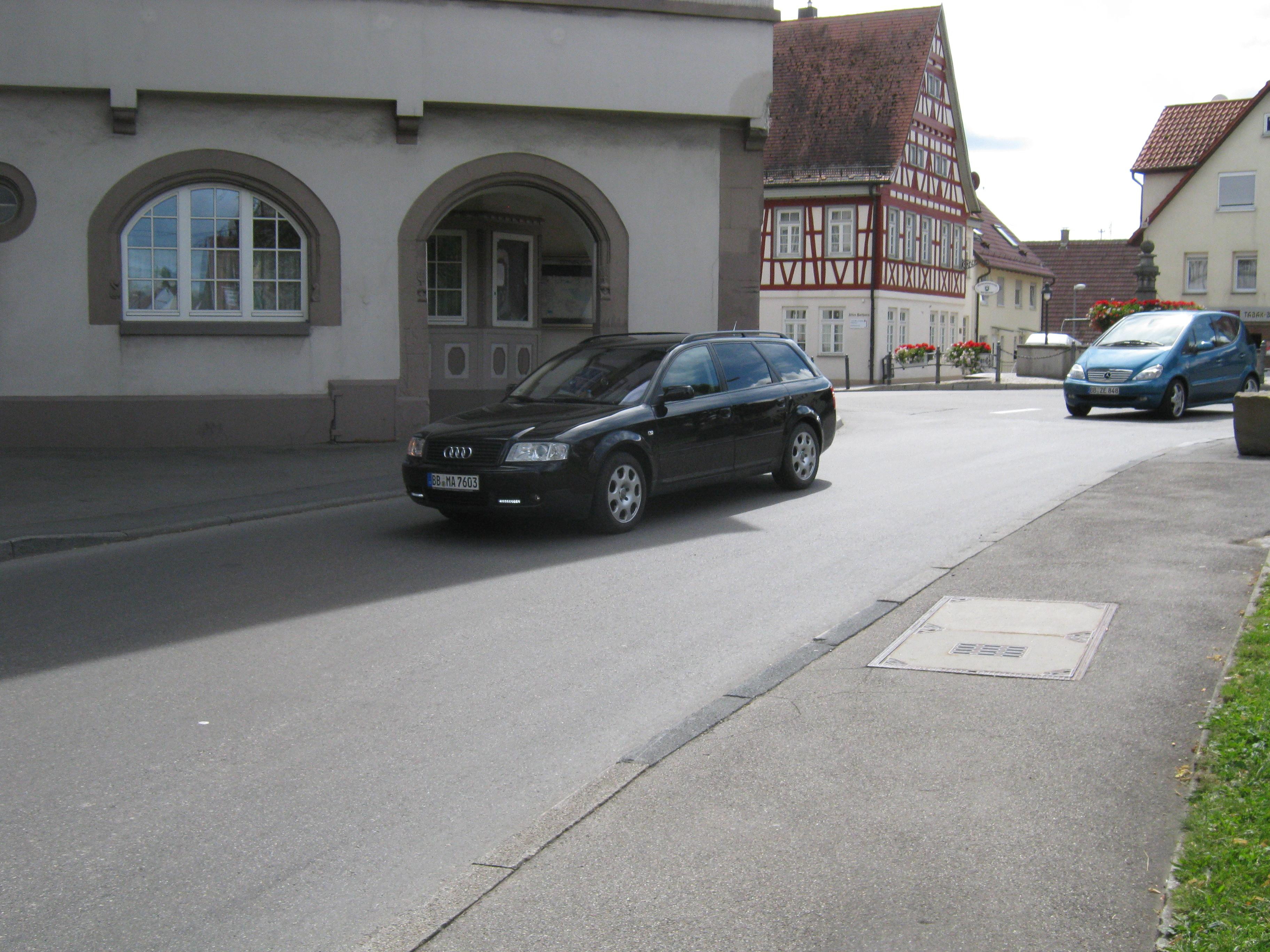 Ein Auto passiert den Magstadter Trichter - Google Maps - Google Earth